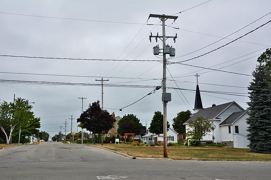 Rogers City, Michigan (E Erie Street)